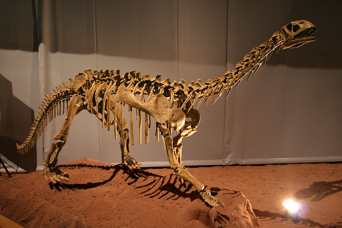 Bellusaurus - 01